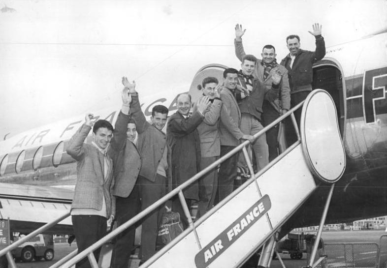 Friedensfahrt, Mannschaft aus Frankreich Zentralbild AFP-Repro Ks-Noa 3.5.1960 - Die Teilnehmer Frankreichs an der XIII. Friedensfahrt 1960. UBz: Die französische Mannschaft vor ihrem Abflug aus Paris. 1.v.l.: Simon; 2.v.l.: Rebiffe; 3.v.l.: Duex; 5.v.l.: Reaux; 6.v.l.: Sciardis; 7.v.l.: Lacombe.